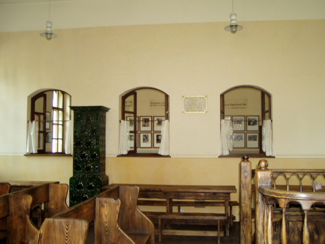 Chewra Lomdei Misznajot Synagogue in Oświęcim